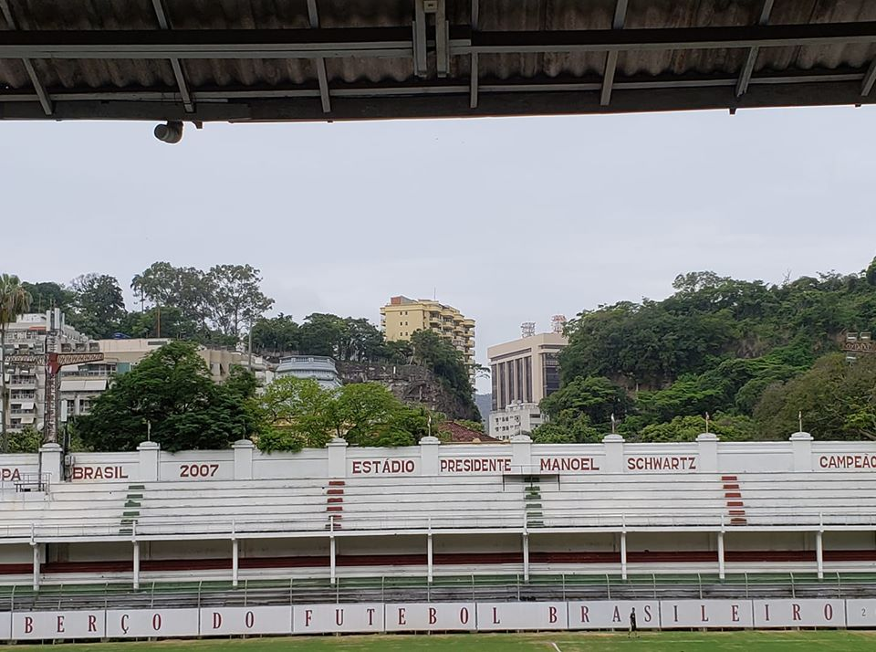 Visão central das arquibancadas do Estádio de Laranjeiras, pertencente ao Fluminense Football Club.